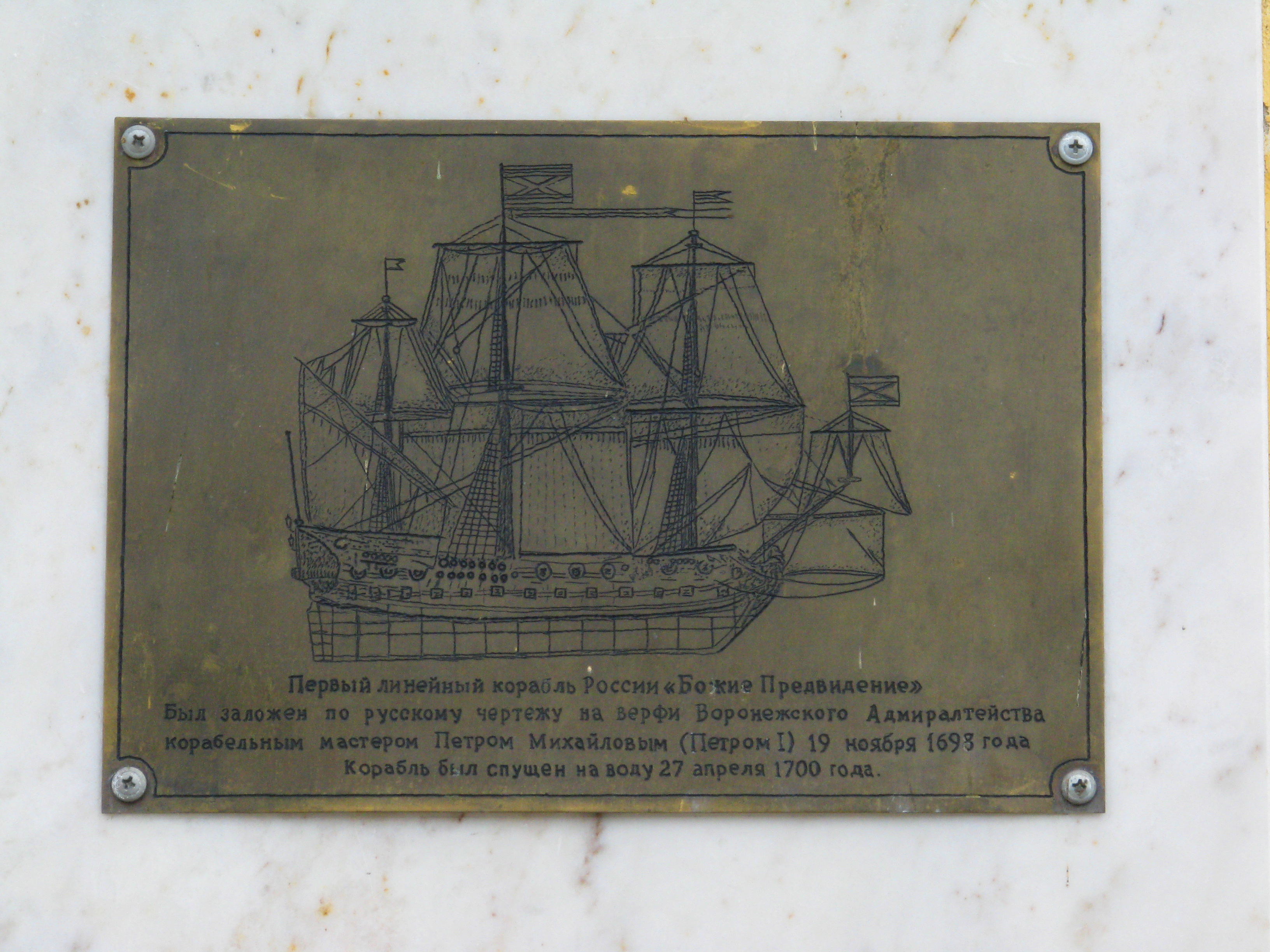 Памятная доска в честь спуска первого 58-пушечного линейного корабля "Гото Предестинация"